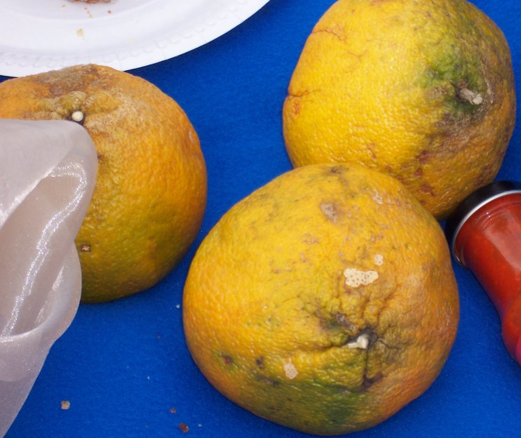 3 Ugli Fruits